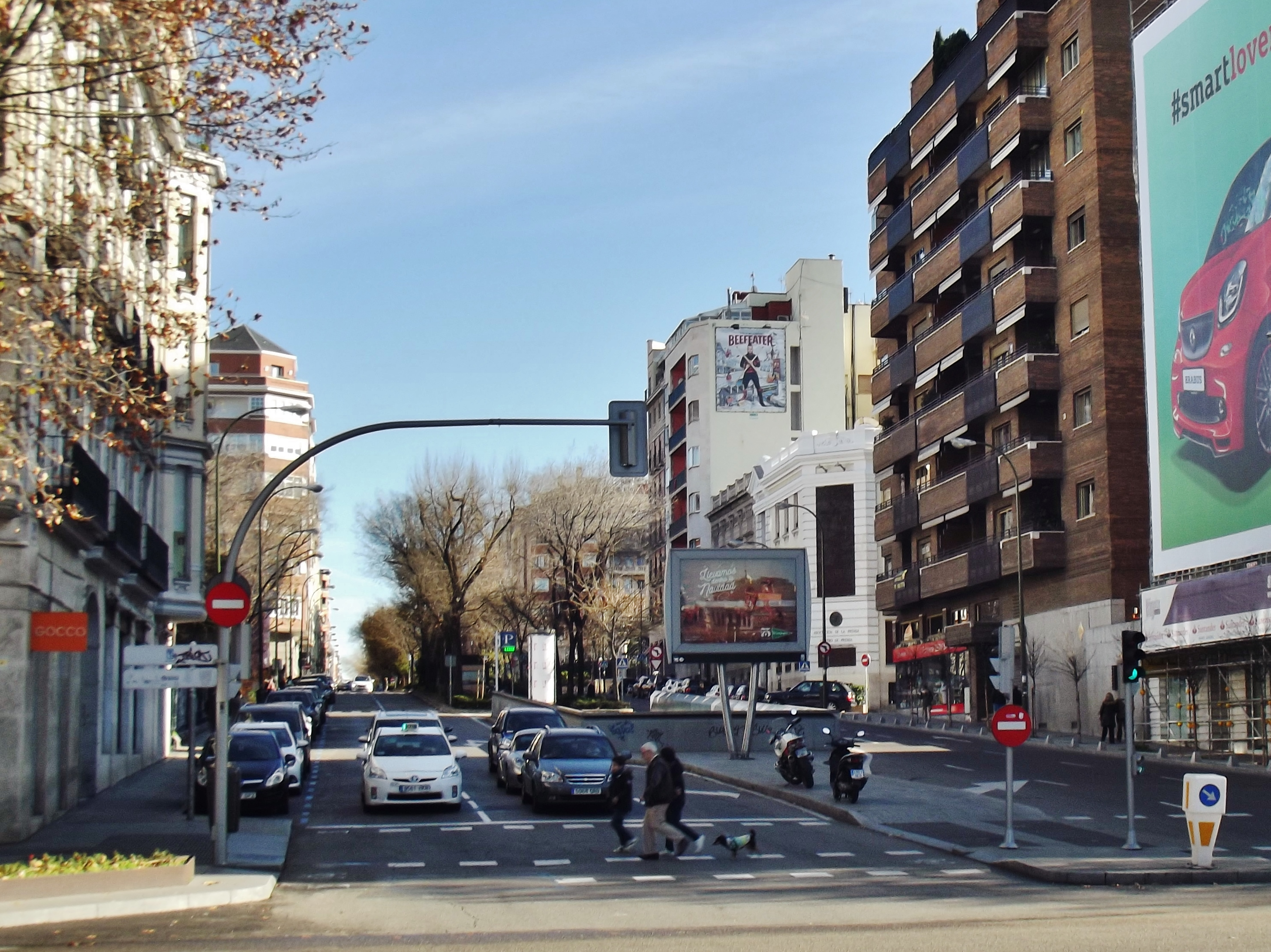 Calle de Juan Bravo desde Serrano.